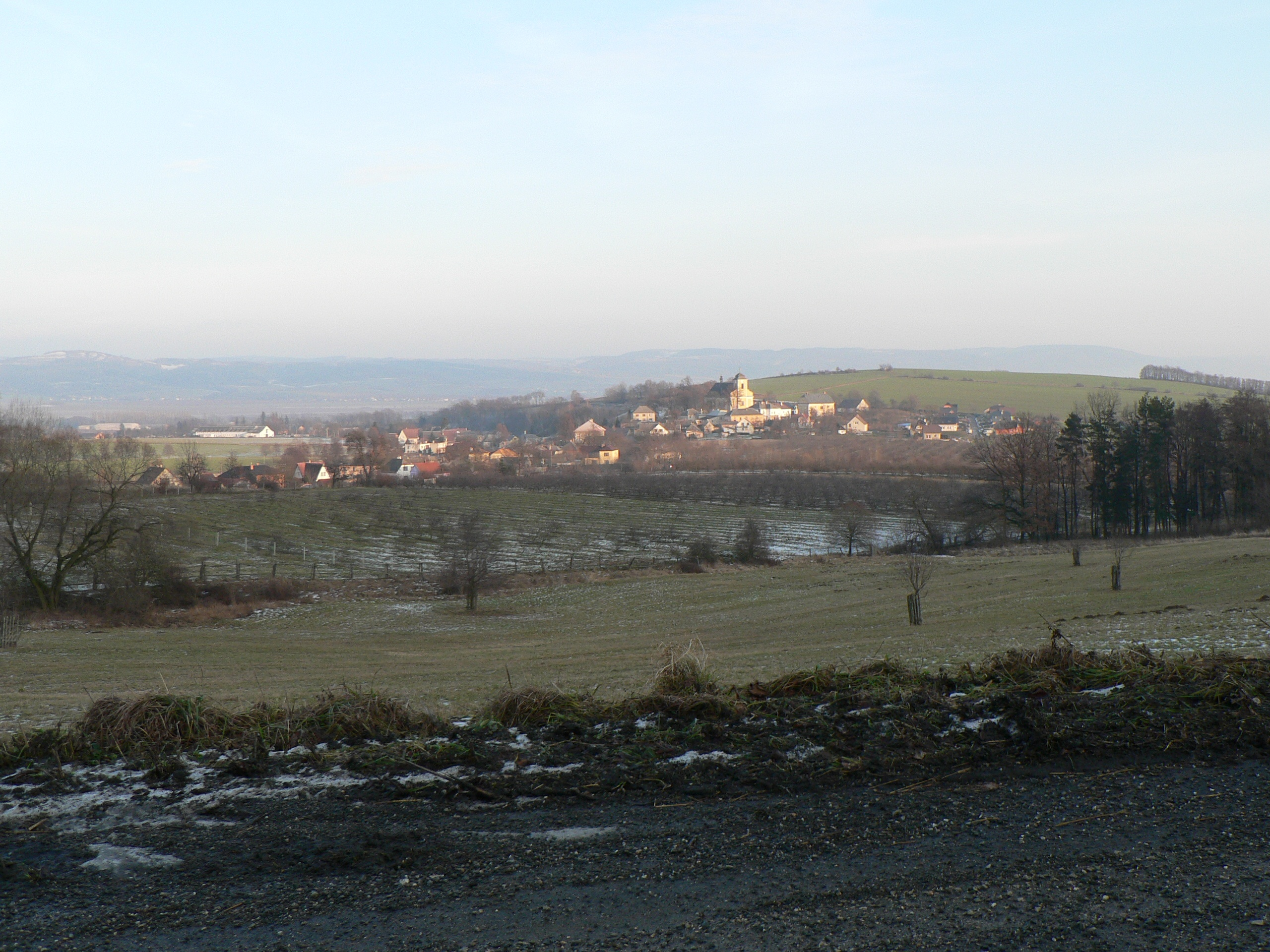 Nová Hradečná